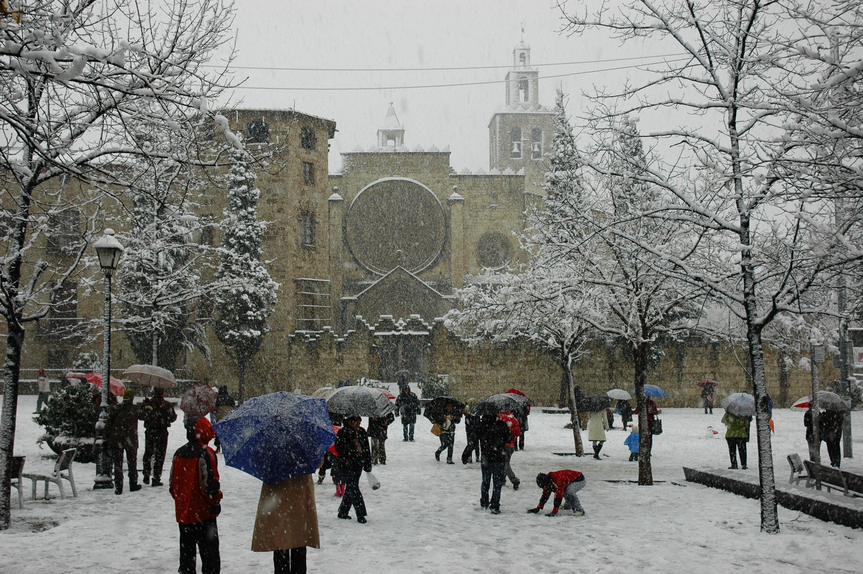 El monestir de Sant Cugat per la nevada del 2010